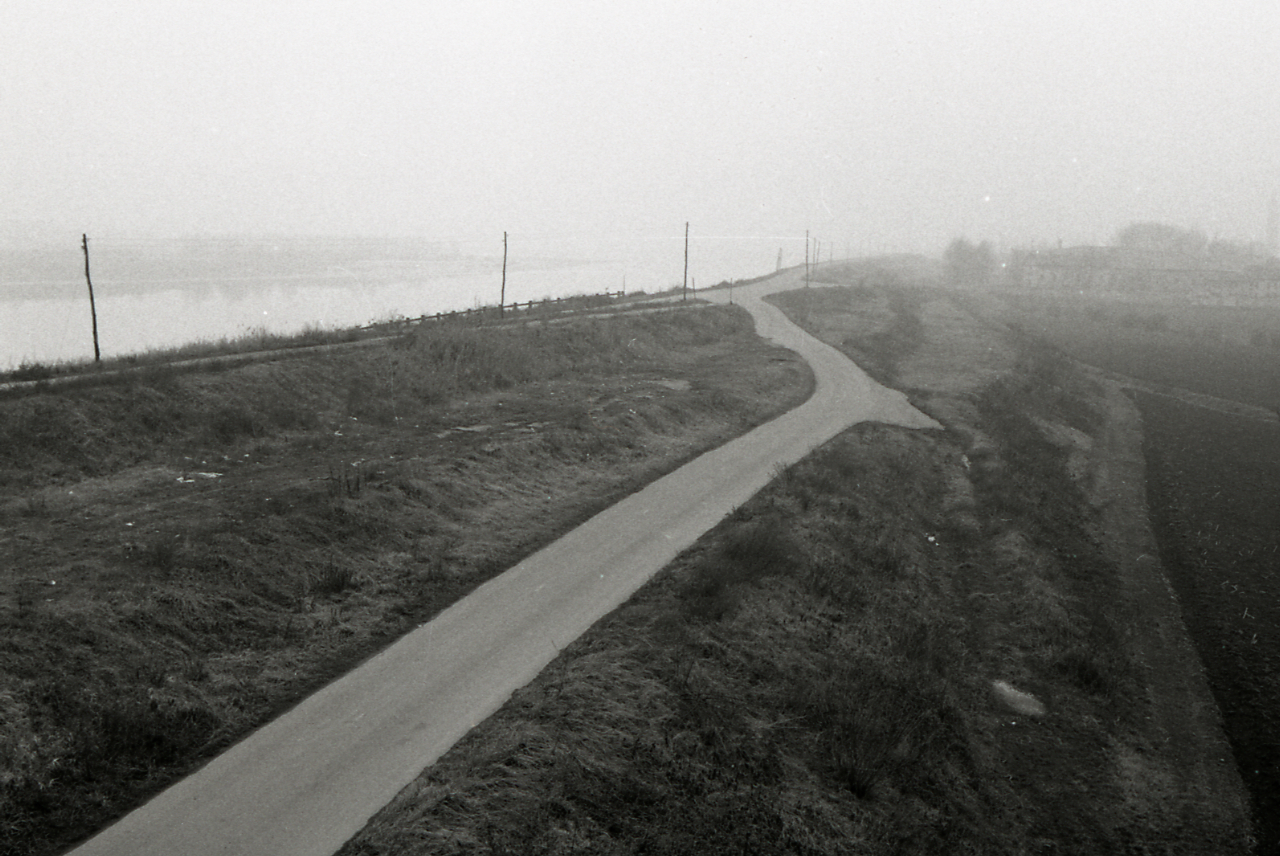 Bondeno. Stellata di Bondeno: paesaggi rurali lungo il fiume Po. Regione. Servizio fotografico : Bondeno, 1975 / Paolo Monti. - Strisce: 5, Fotogrammi complessivi: 26 : Negativo b/n, gelatina bromuro d'argento/ pellicola ; 35 mm. - ((Sul portanegativi: N[I]K[MA]T FP4 e iscrizione didascalica e documentaria manoscritta a penna blu "La Stellata - Po 1/27". - All'interno del portanegativi: la serie è anche identificata da una linea orizzontale a pennarello nero che separa la suddetta serie dalla successiva di soggetto diverso. - Occasione: Documentazione del territorio della provincia di Ferrara e dei centri storici minori. - Fonte: Agenda di Paolo Monti: Leica 1501-3000 Controllo numerazione (1950-1978), presso Archivio Paolo Monti. - Fonte: Fattura di Paolo Monti: IV. Commesse/ Fattura n. 11 (1975/04/29), presso Archivio Paolo Monti. - Fonte: Monografia: Territorio ferrarese: un programma di governo della Regione e delle autonomie locali, catalogo della mostra, Ferrara 1975, a cura di Roberto FREGNA, Modena, Soc. Immobiliare & Poligrafica emiliana (1975)